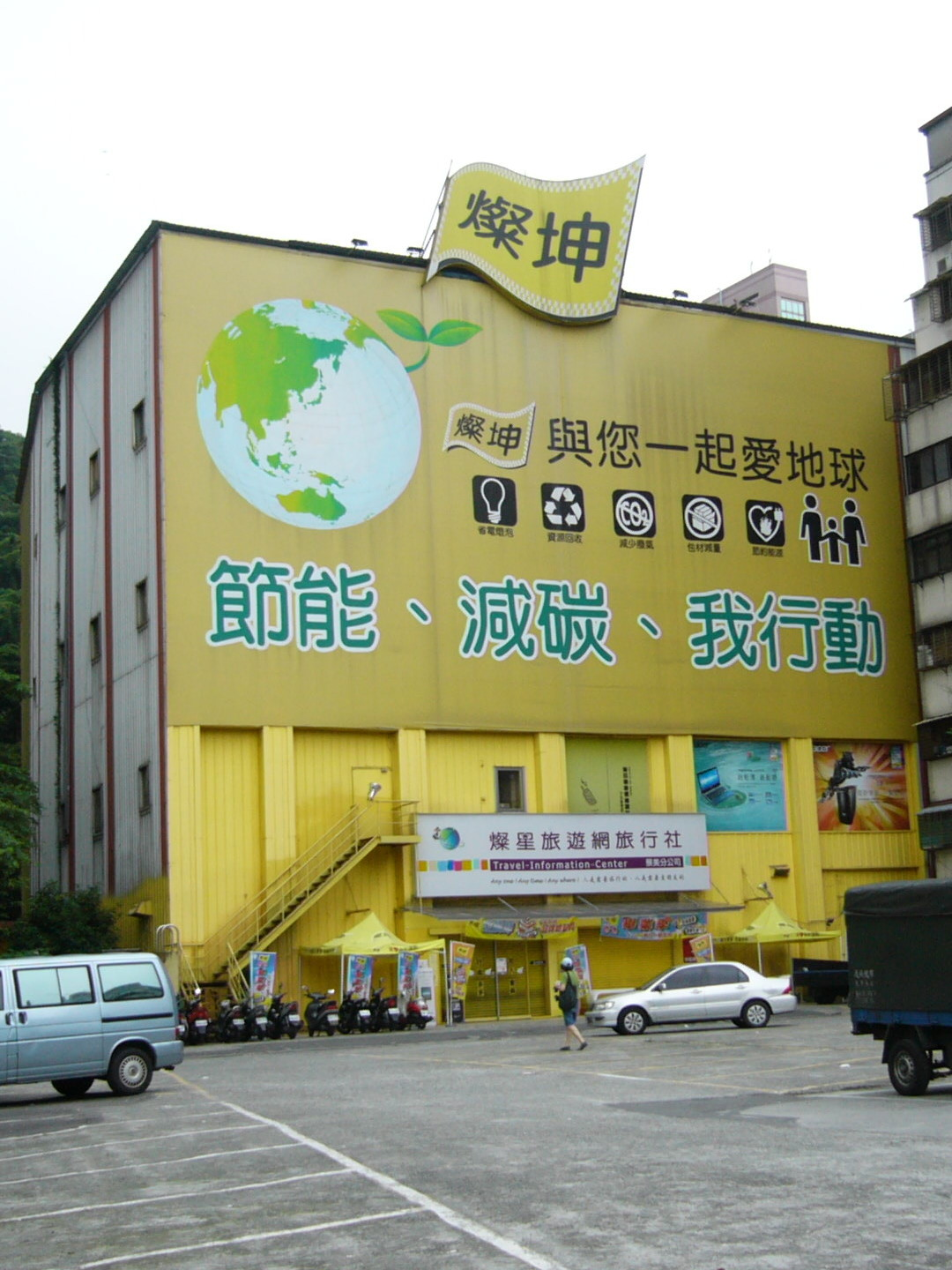 臺北市文山區景興路，燦坤3C景美店後方。